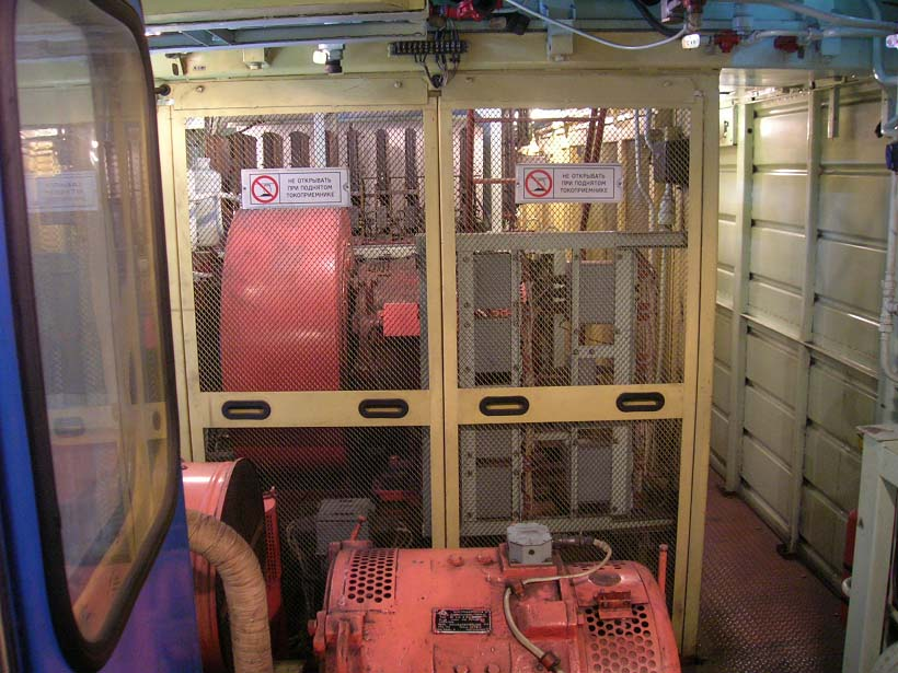 Задняя часть секции электровоза ДЭ1Вид из межсекционного перехода. В верхней части снимка за сеткой несколько контакторов вспомогательных машин, в средней мотор-вентилятор, в нижней двигатель компрессора